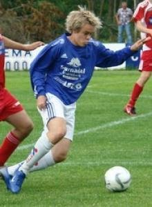 Helge for Surnadal